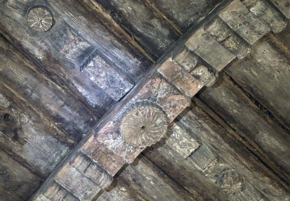 Biserica de lemn din Tusa, arce de boltă.